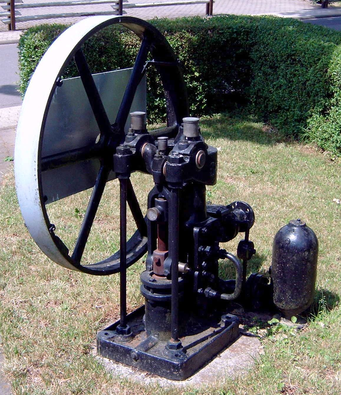 Ehemalige Wasserpumpe der Gemeinde Hundheim im Hunsrück, Baujahr 1935, Fa. Klein-Schmanzlin und Becker, Frankenthal (Pfalz)